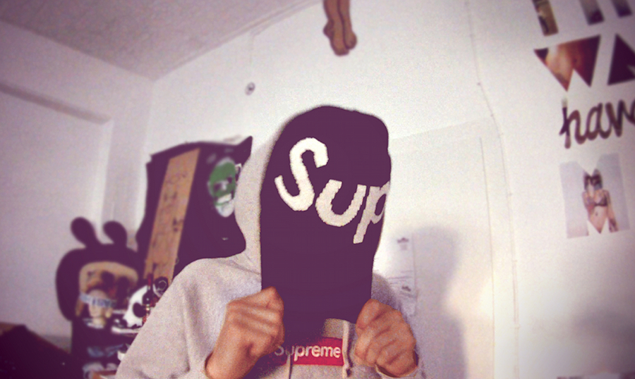 Cro im Jahr 2011